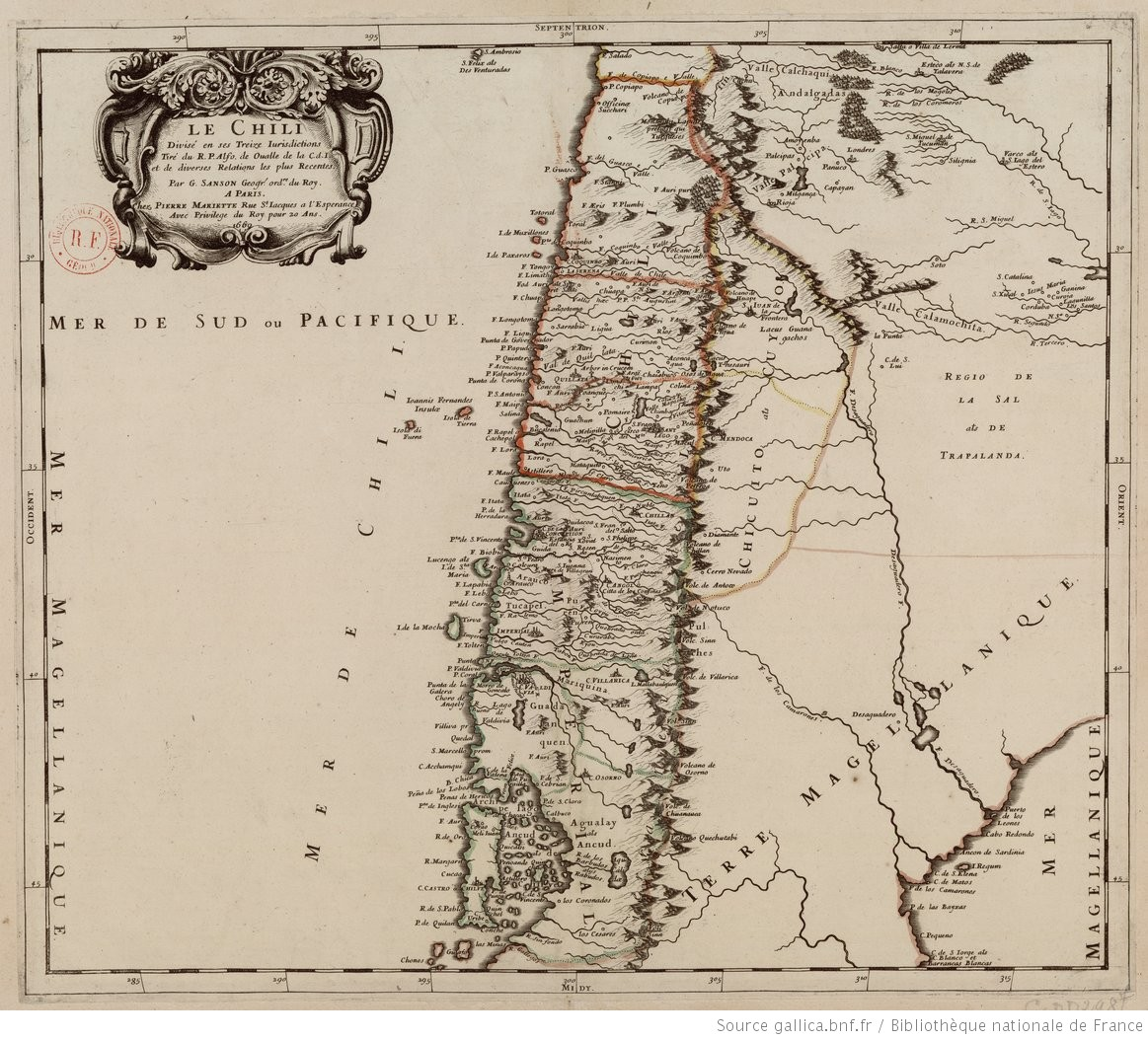 Las trece jurisdicciones en que se dividía la Capitanía General de Chile en 1669